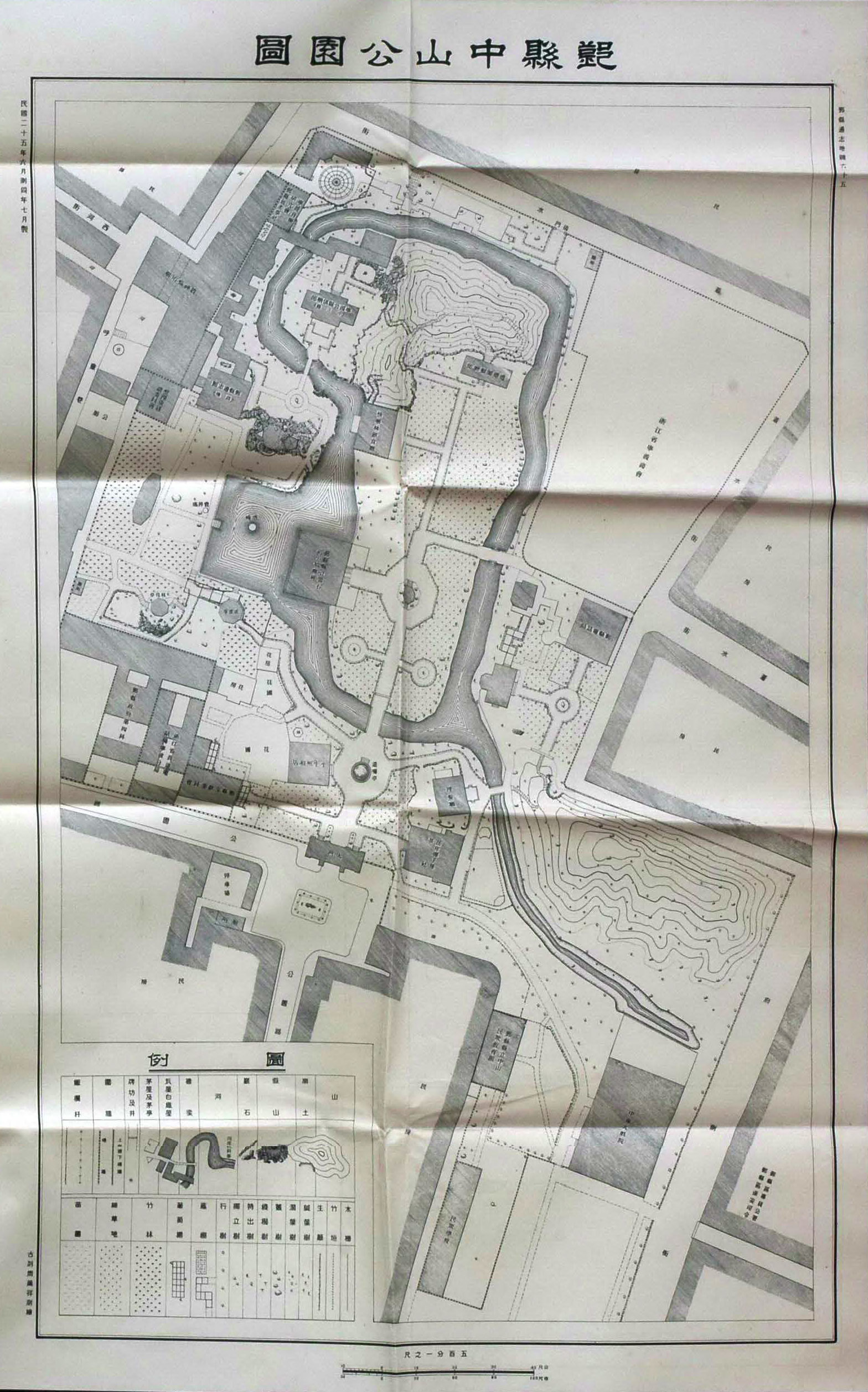 中华民国二十五年制鄞县中山公园图